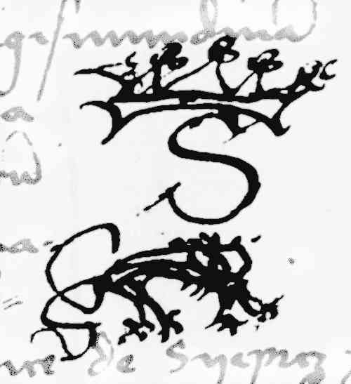 Uproszczony rysunek umieszczony w tekście przywileju Zygmunta I dla sierpeckich sukienników z dnia 1 XI 1509 r., przedstawiający wzór stempla sukienniczego